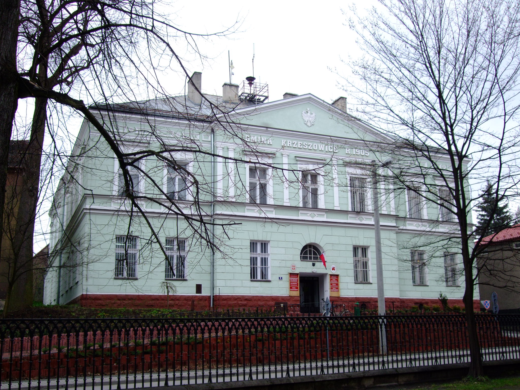 Urząd Miejski w Krzeszowicach, ul.Grunwaldzka 4.